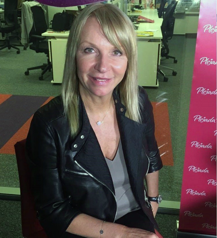 Polska gimnastyczka artystyczna i dziennikarka Mariola Bojarska-Ferenc w październiku 2016 roku.